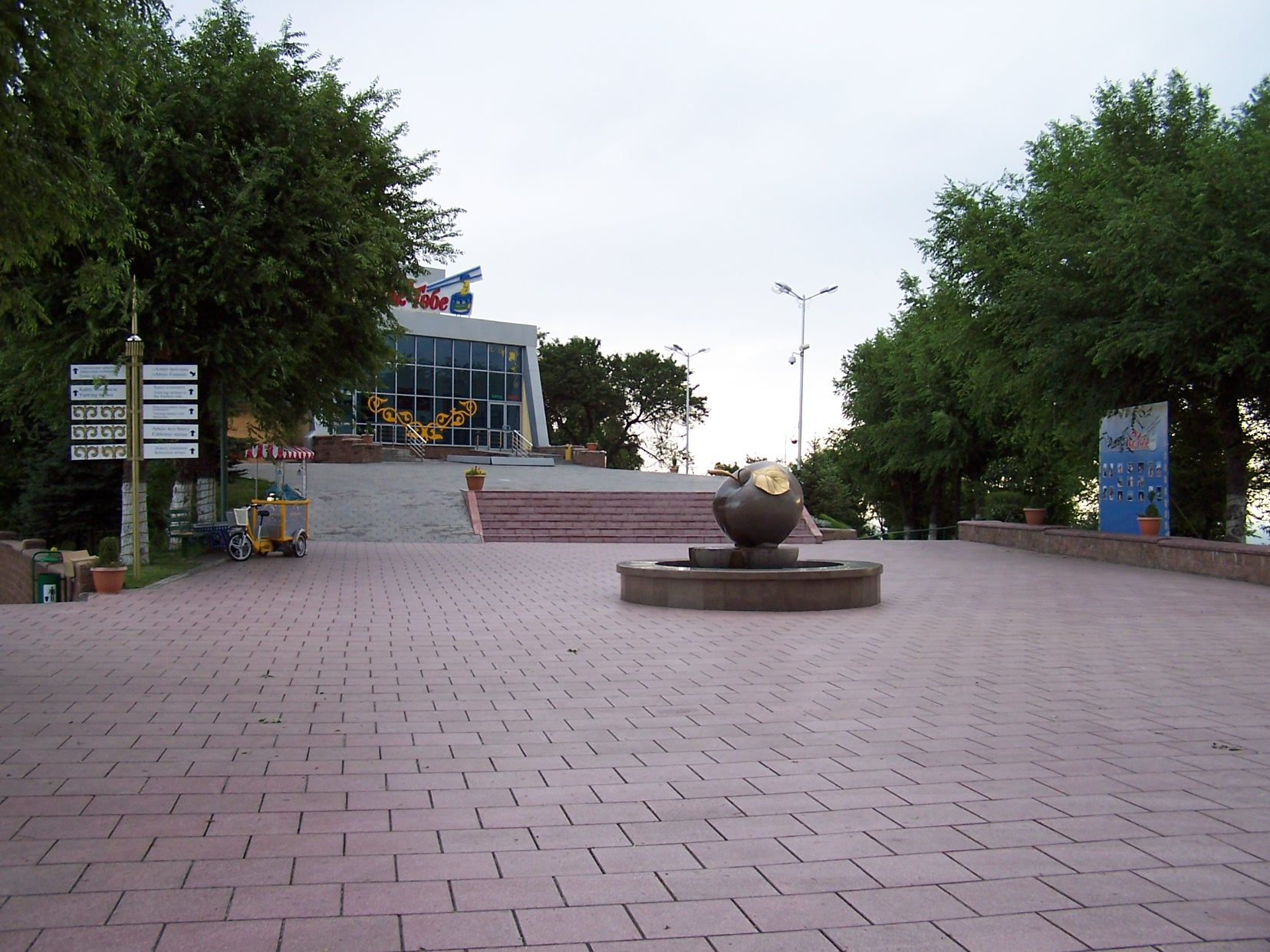 카자흐스탄 알마티 타워